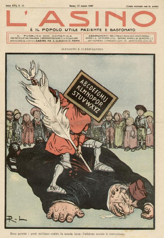 Vignetta anticlericale